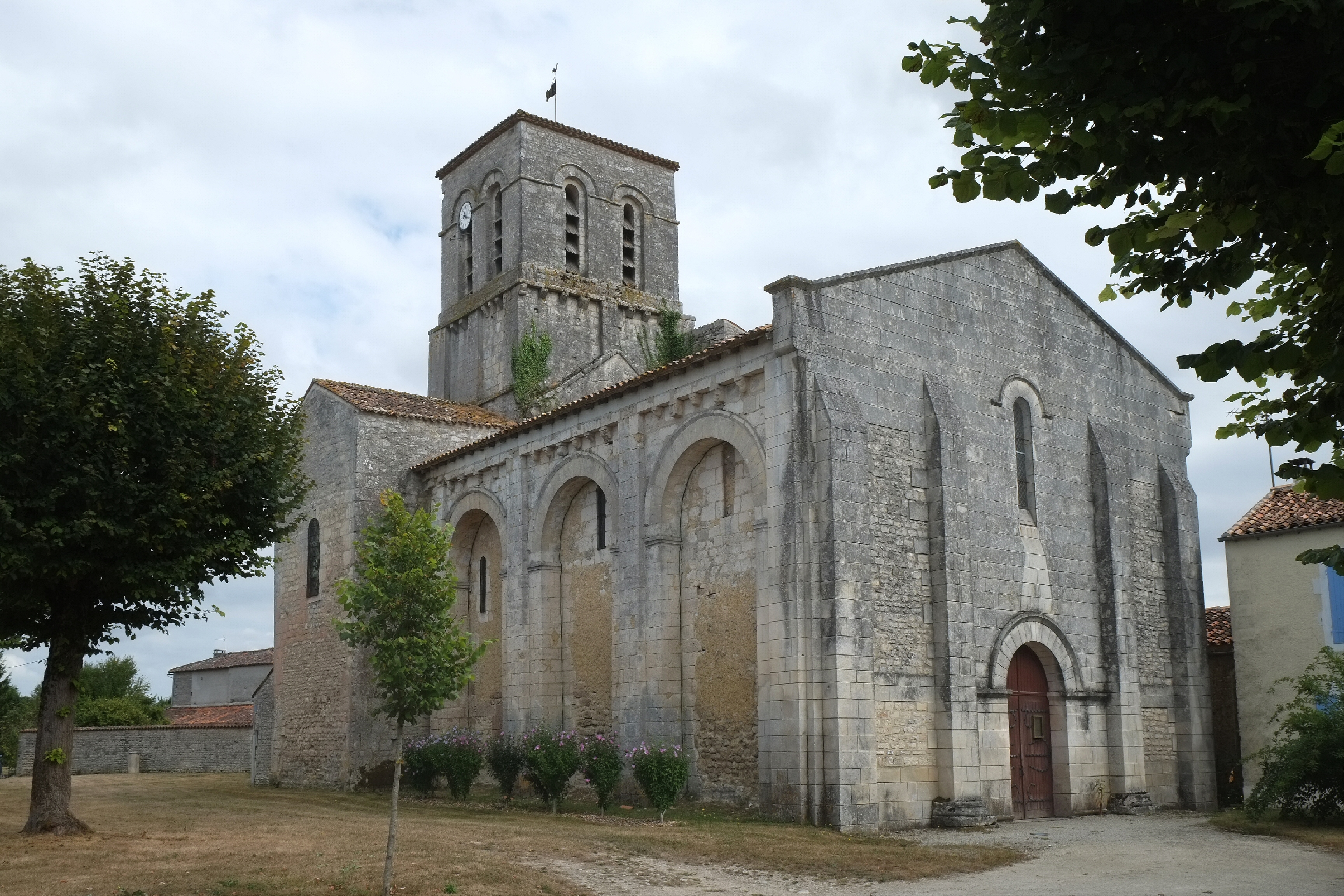 Église de la Transfiguration Cressé Charente-Maritime France